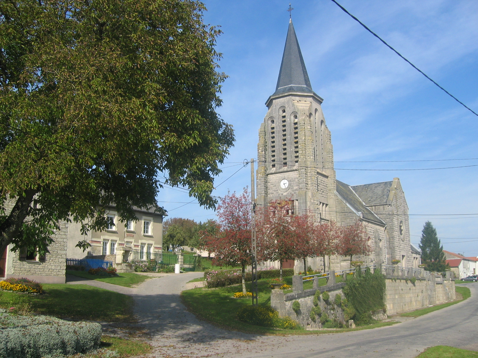 Eglise de Bantheville